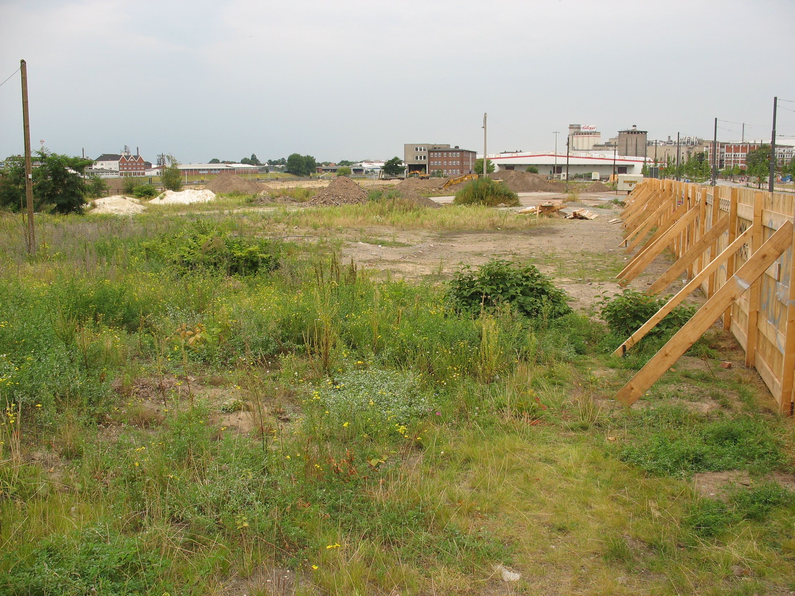 Brachland, Baustelle für den Weser Tower